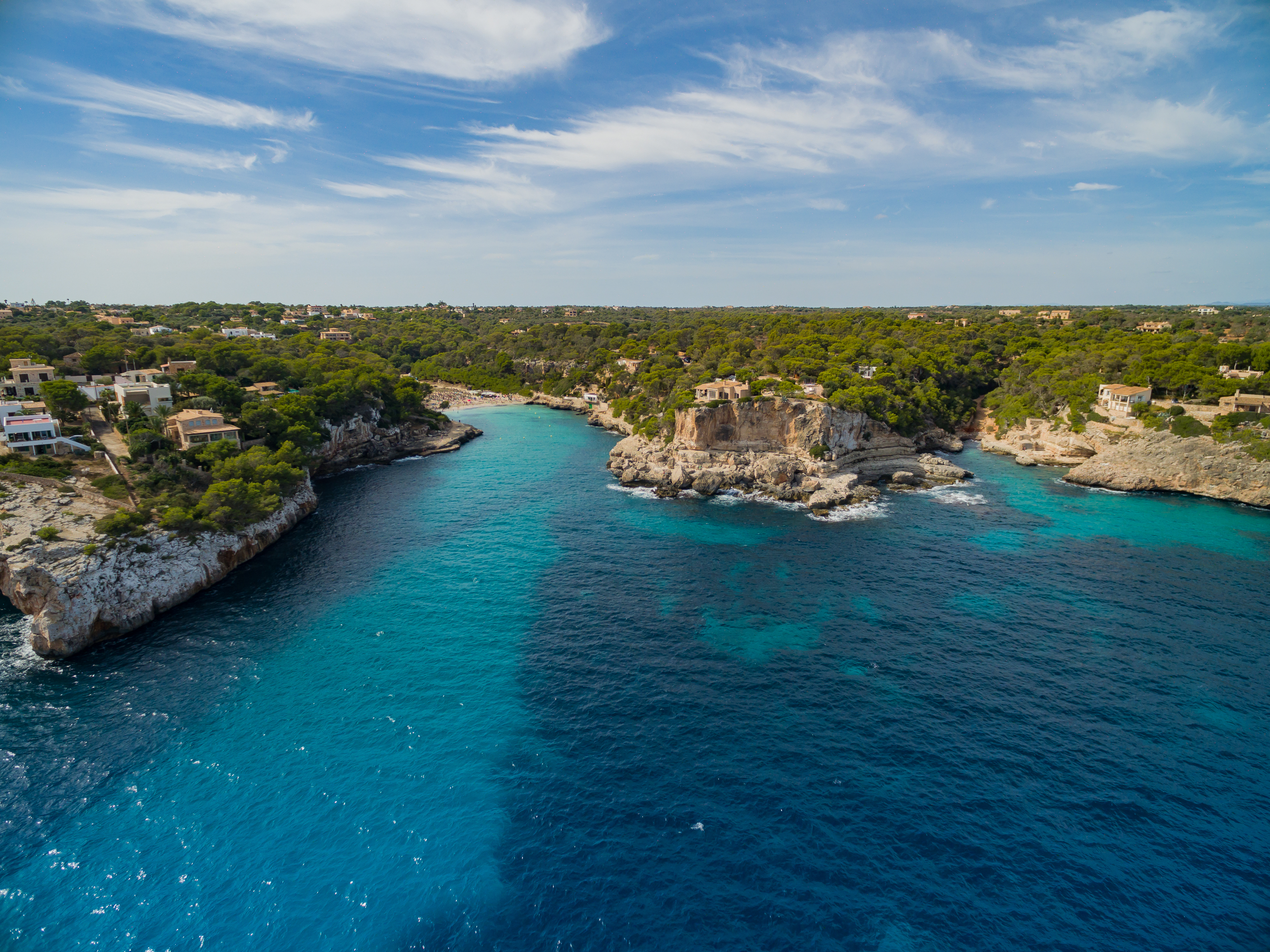 Mallorca Strände Cala Llombards